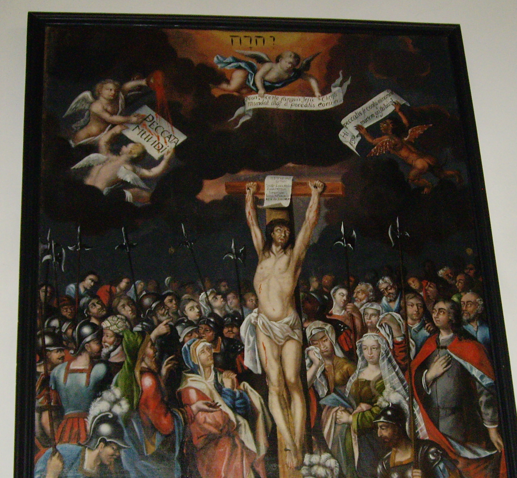 Oljemålning av Edward Orm 1722 i Kristine kyrka, Jönköping